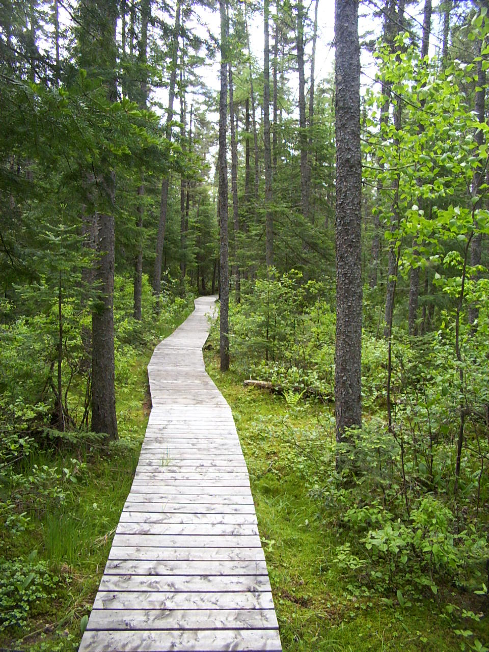 Sentier dans la Tourbiere du Parc Frontenac, Quebec [1] Auteur:David Charron